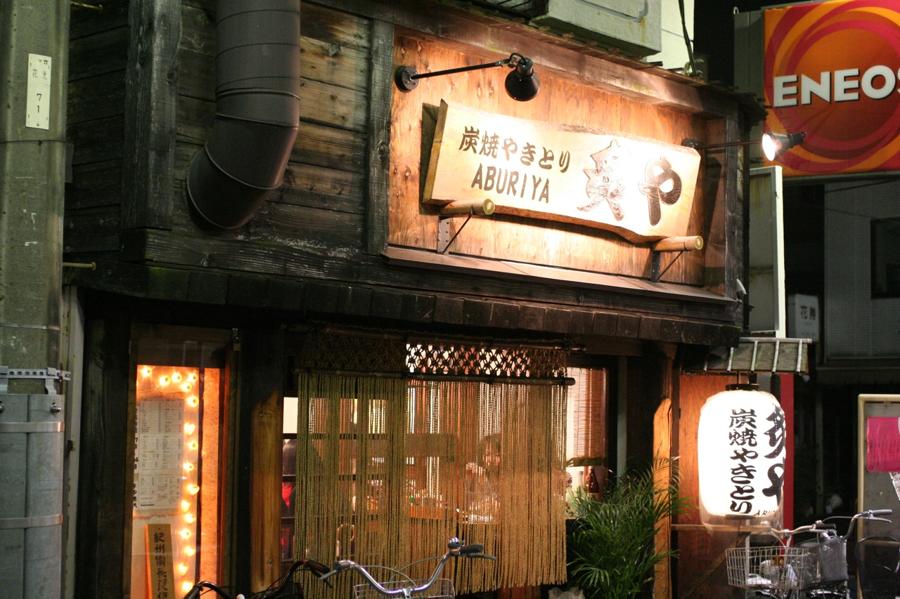 my favourite yaki niku place, Aburiya